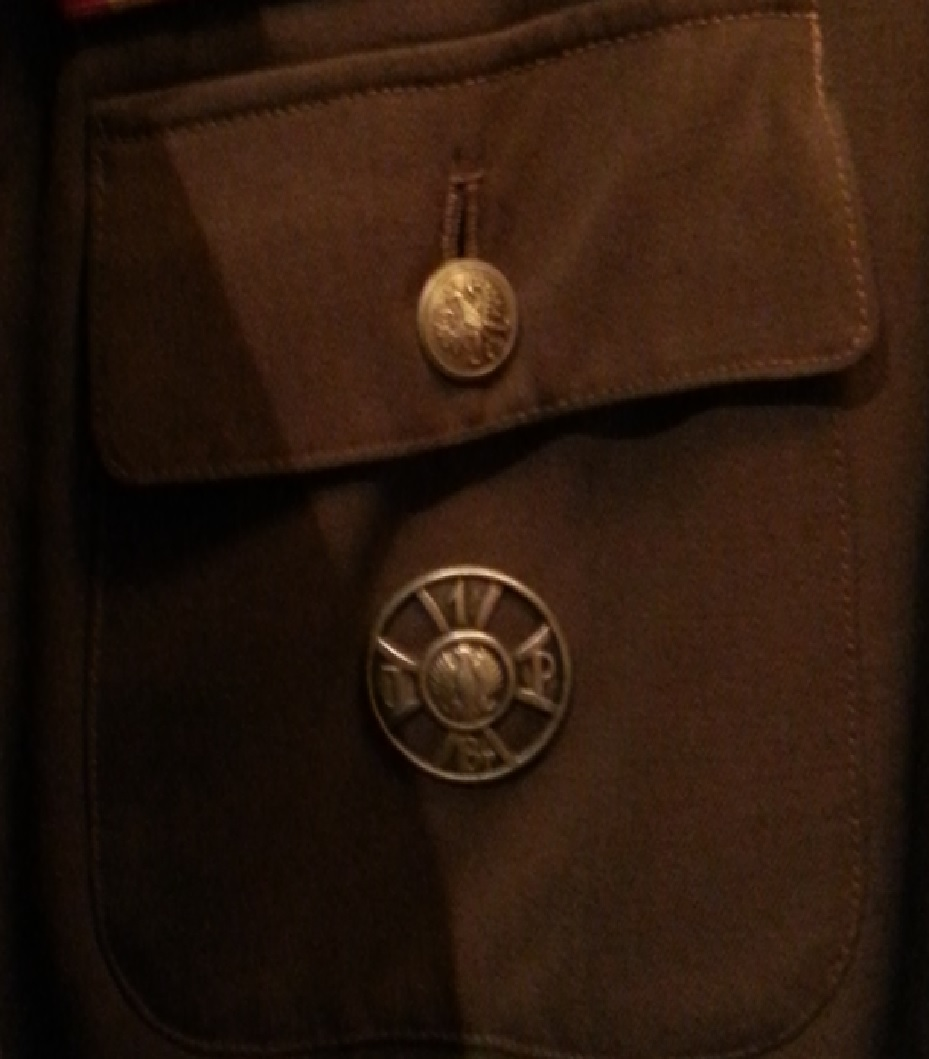 Odznaka honorowa I-szej Brygady Legionów, która pochodzi z munduru uczestnika kilkunastu bitew Legionów Mieczysława Barys, późniejszego majora walczącego również podczas II Wojny Swiatowej.